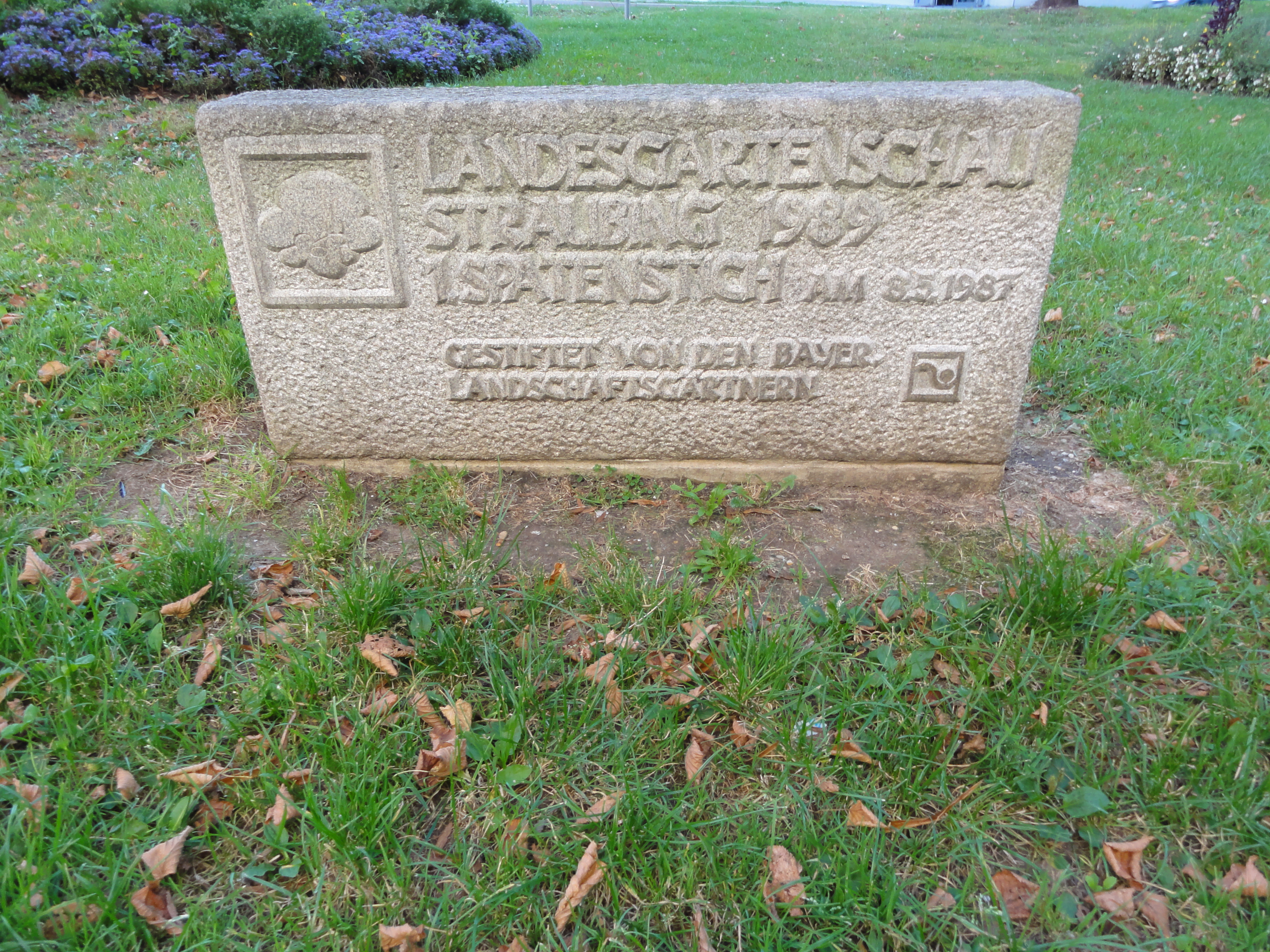 Straubing - Landesgartenschau 1989, 1. Spatenstich (Gedenkstein) Info GPS data may be inaccurate. EXIF data regarding date and time may be inaccurate.